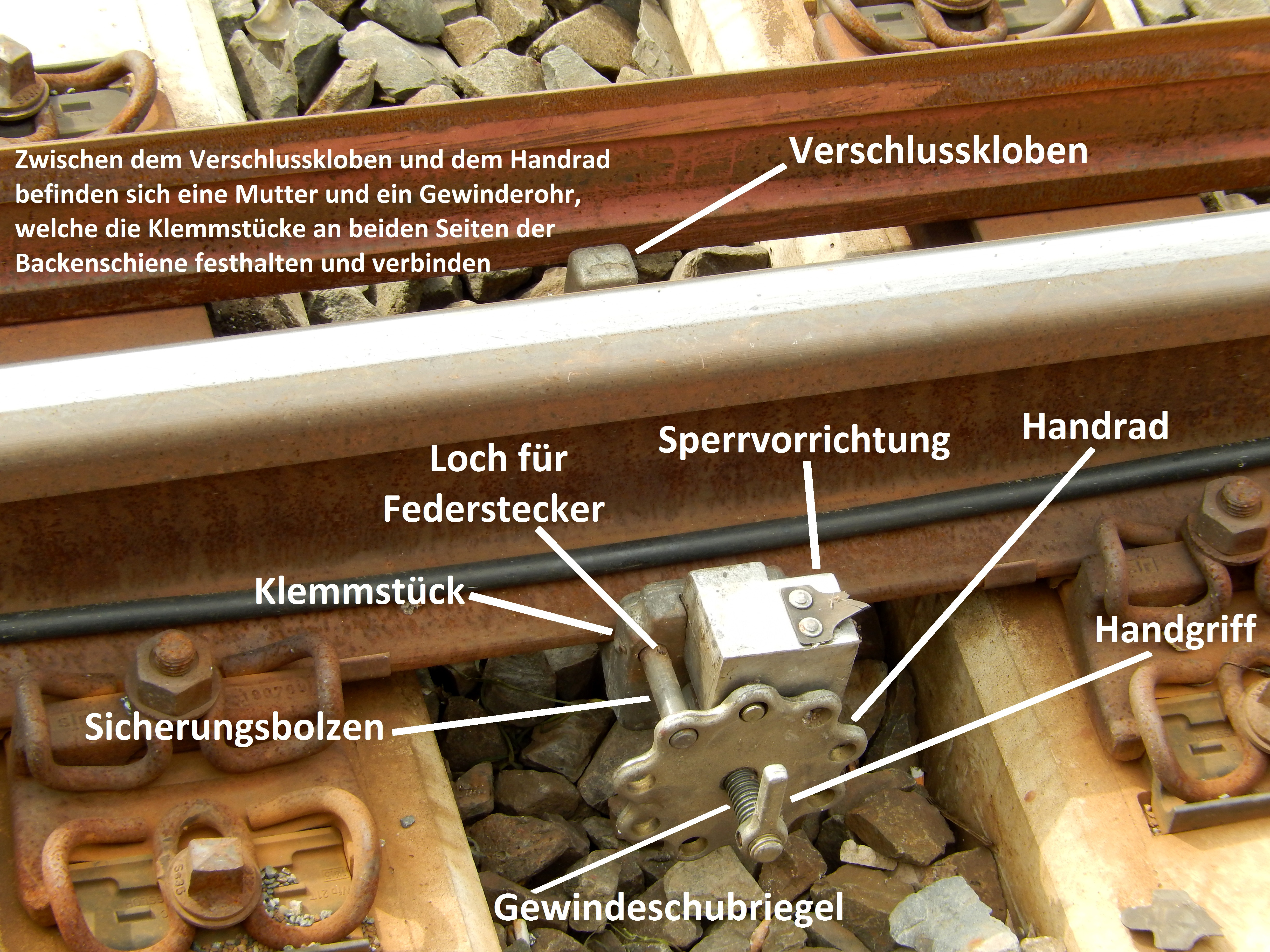 Handverschluss 73 mit Sperrvorrichtung (HV 73 Sp) im Bahnhof Guntersblum